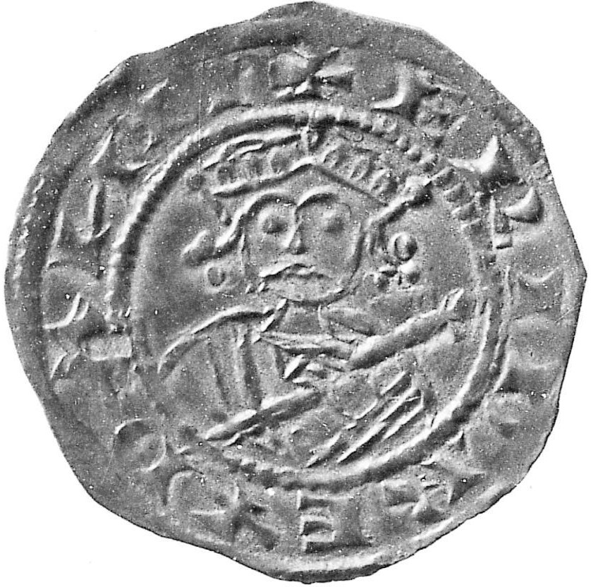 Erik 1. Ejegods mønt, præget i Lund. Møntportrættet har ingen portrætlighed, men giver et indtryk af, hvorledes kongen gerne ville fremtræde over for landets indbyggere. Gengivet i 2:1; Den Kgl. Mønt